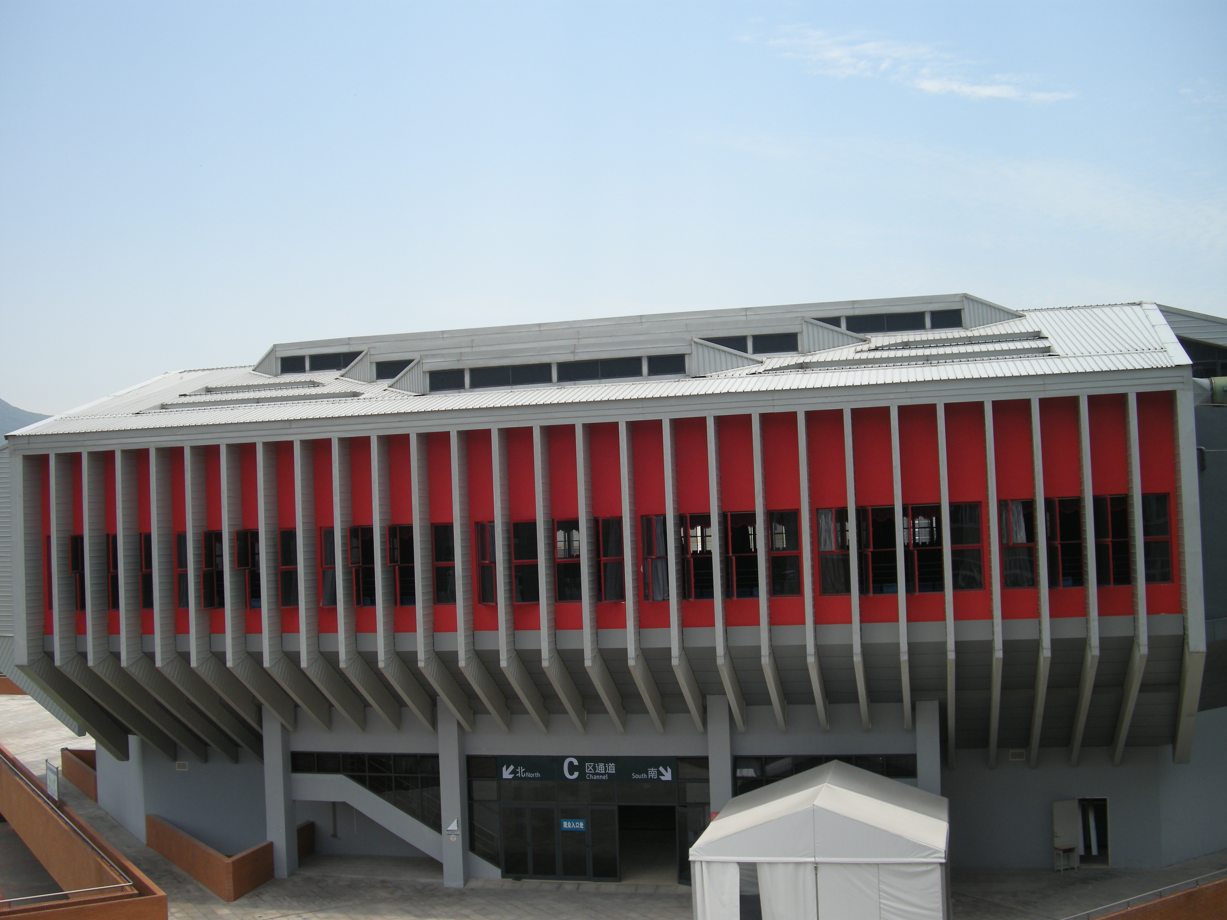 中文（中国大陆）: 深圳外国语学校高中部体育馆，2010年深圳大运会的篮球比赛场馆，于2011年5月18日拍摄